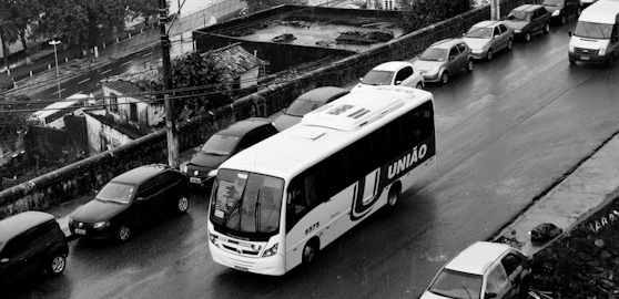 Micro-ônibus da União, na Ladeira da Montanha, em Salvador.